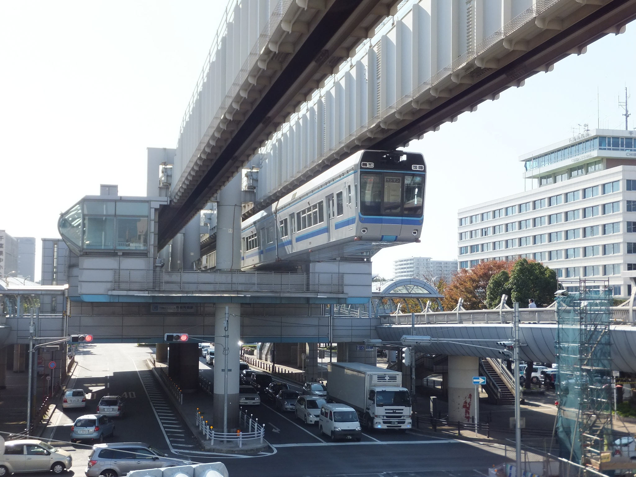 千葉都市モノレール市役所前駅歩道橋から